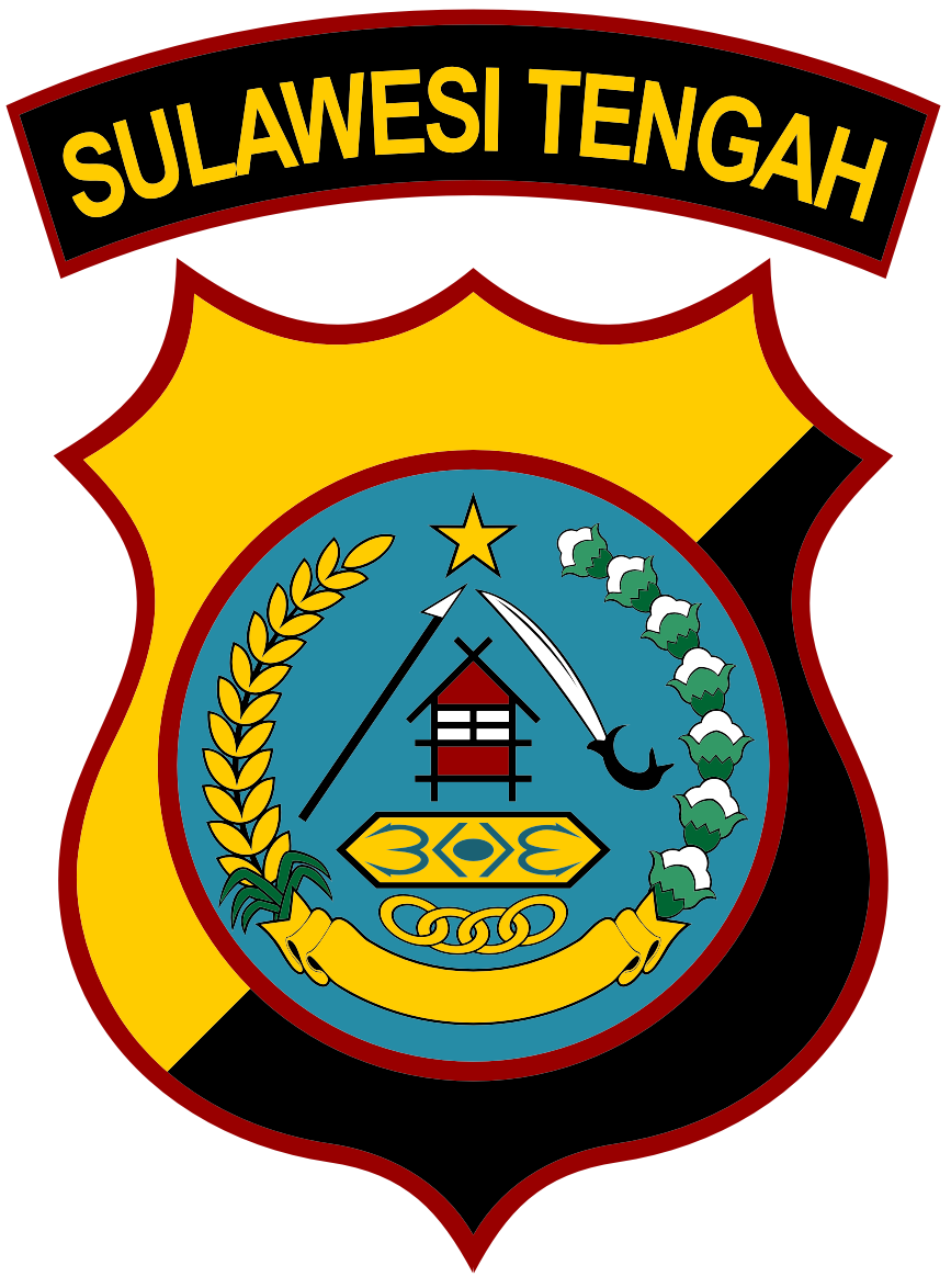 Gambar ini adalah Lambang Kepolisian Daerah Sulawesi Tengah